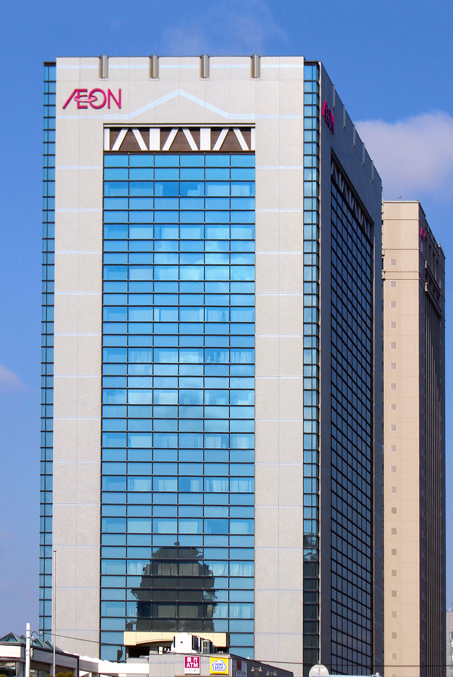 イオンタワーANNEX20190305